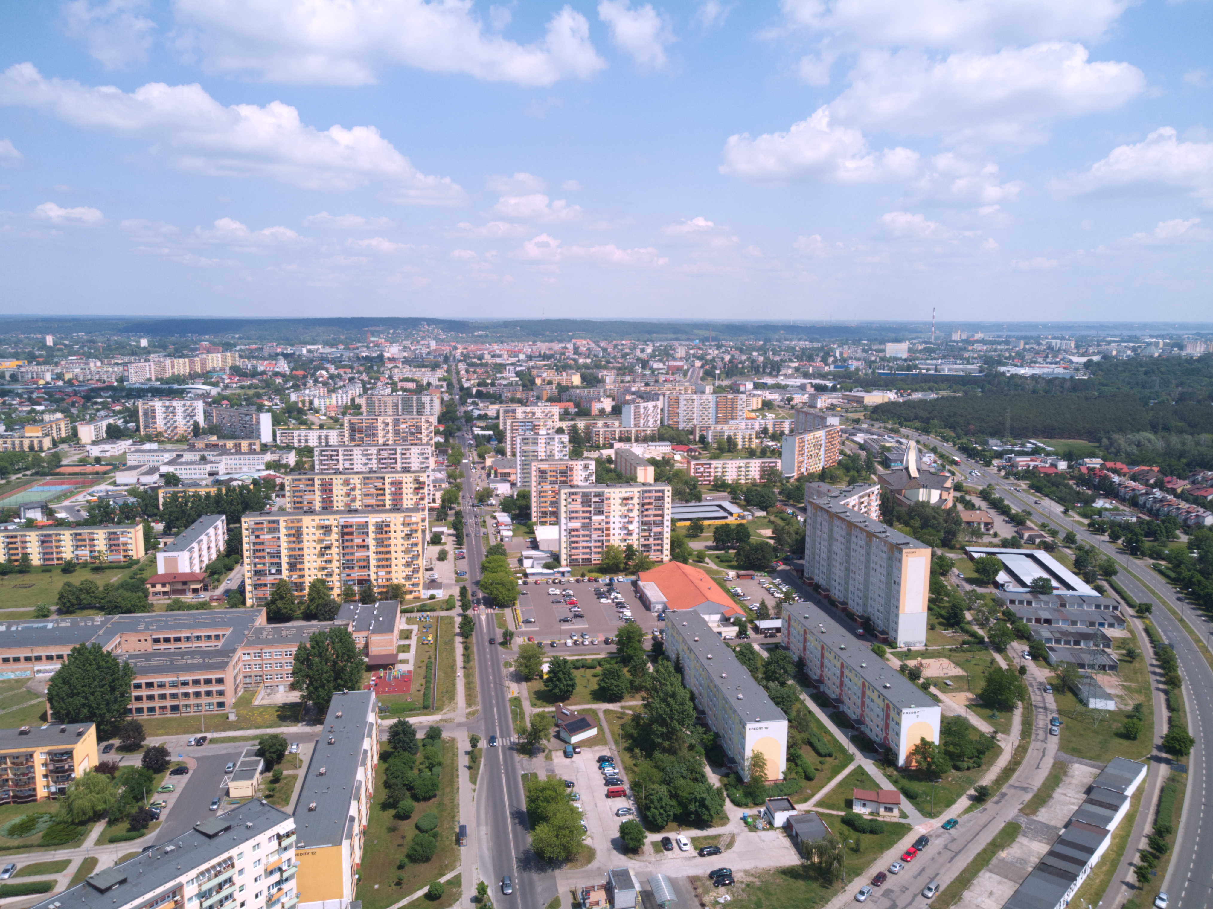 Dzielnica Południe z lotu ptaka (2020 r.)